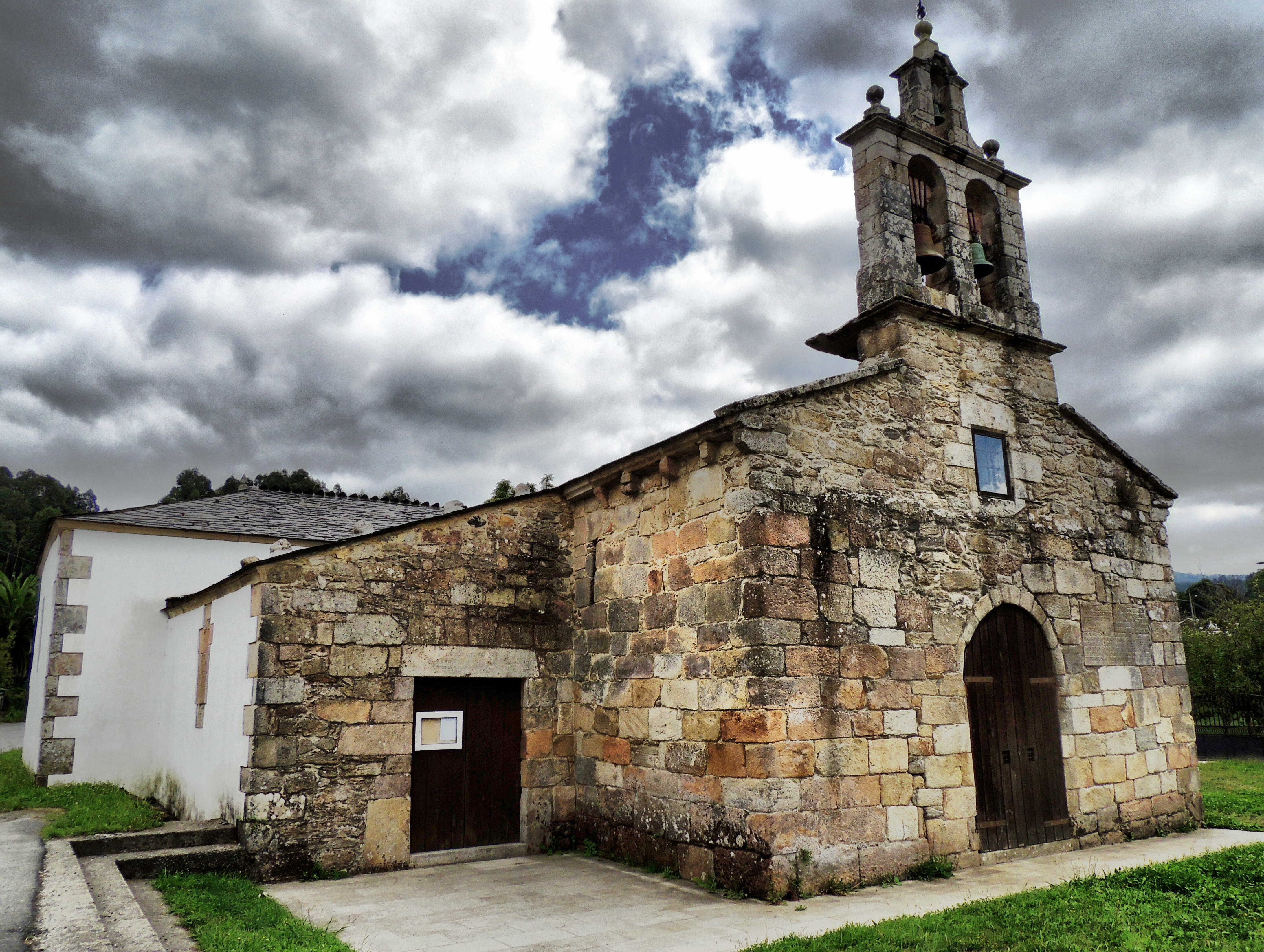 De estilo románico, es la más antigua de la zona. Data del siglo X, aunque su construcción originaria se remonta al siglo VI. Fue ampliada y reformada en los siglos XII y XVII. Destacan las inscripciones en los muros exteriores y los elementos antiguos del alero.